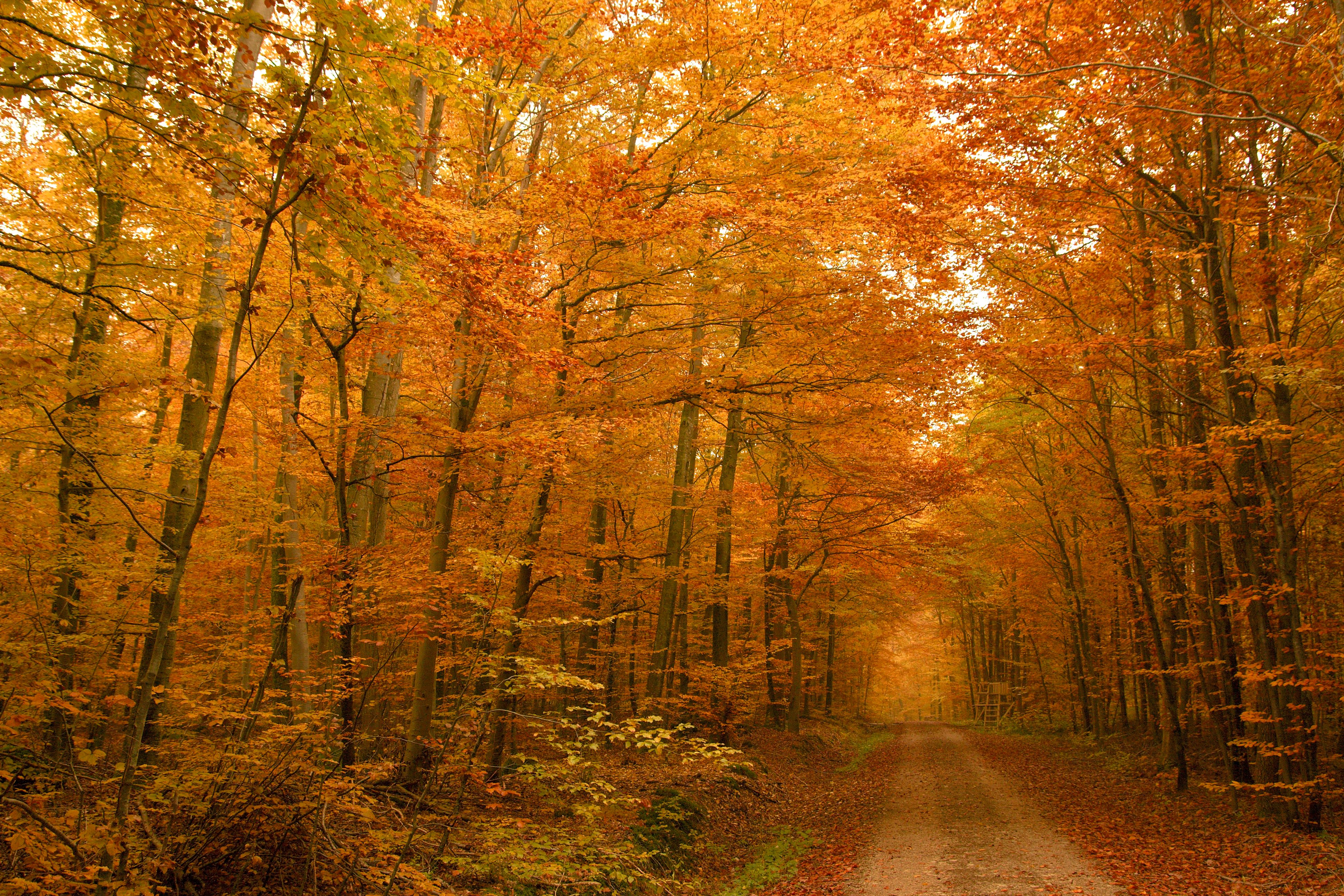 Großflächige Waldlandschaft mit Buchen- und Eichen-Hainbuchenwäldern, Waldmeister-Buchenwald. FFH-Gebiet: Donauwörther Forst mit Standortübungsplatz und Harburger Karab; Naturwaldreservat.